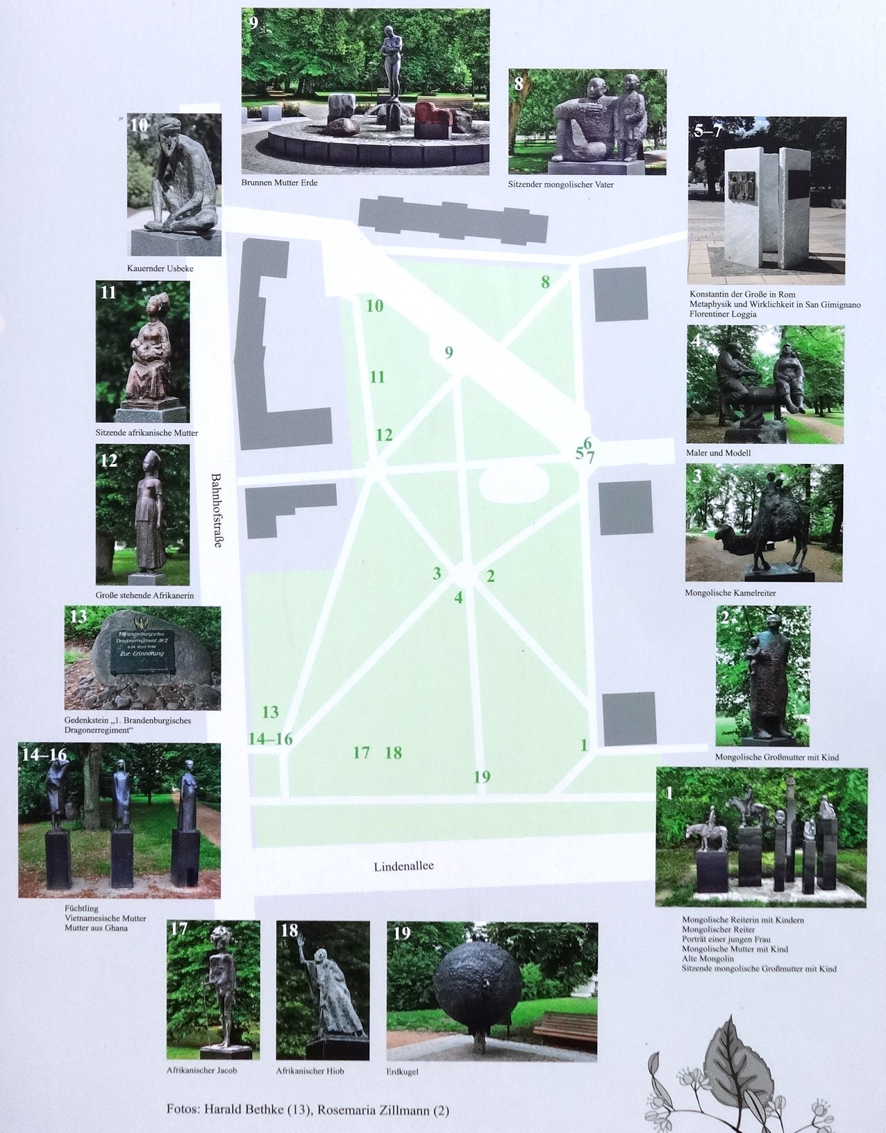 Der Stadtpark in Schwedt/Oder ist eine Grünfläche in der Altstadt, die 1978 auf dem ehemaligen städtischen Friedhof angelegt wurde. Auf dem Gelände befinden sich mehrere Skulpturen von Schwedter und auswärtigen Künstlern aus den Jahren 1961 bis 2010.